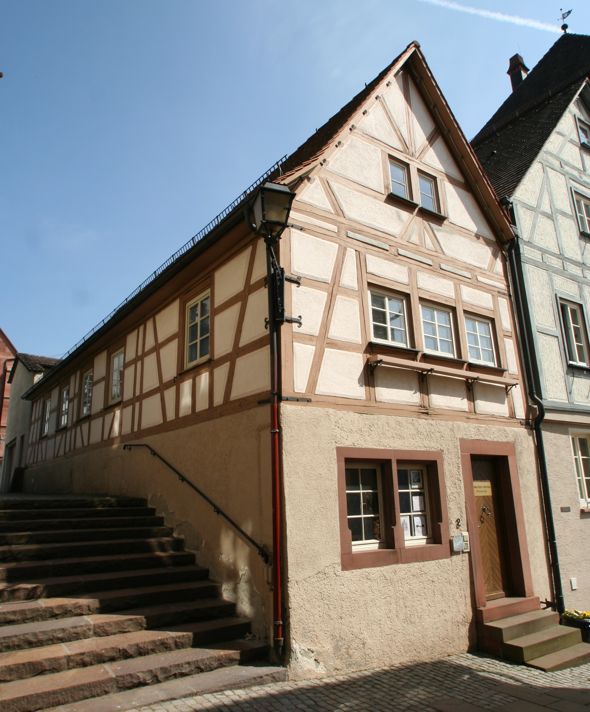 Maison natale (1571) de Jean Kepler à Weil der Stadt. Maintenant musée sur Kepler.